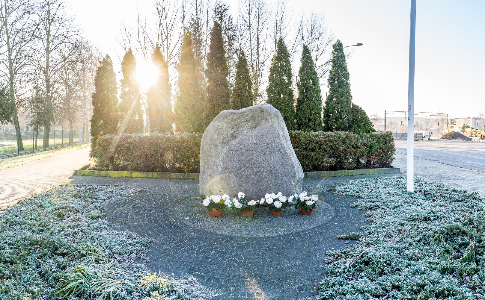 Pomnik pamięci Powstańców Wielkopolskich w Chodzieży